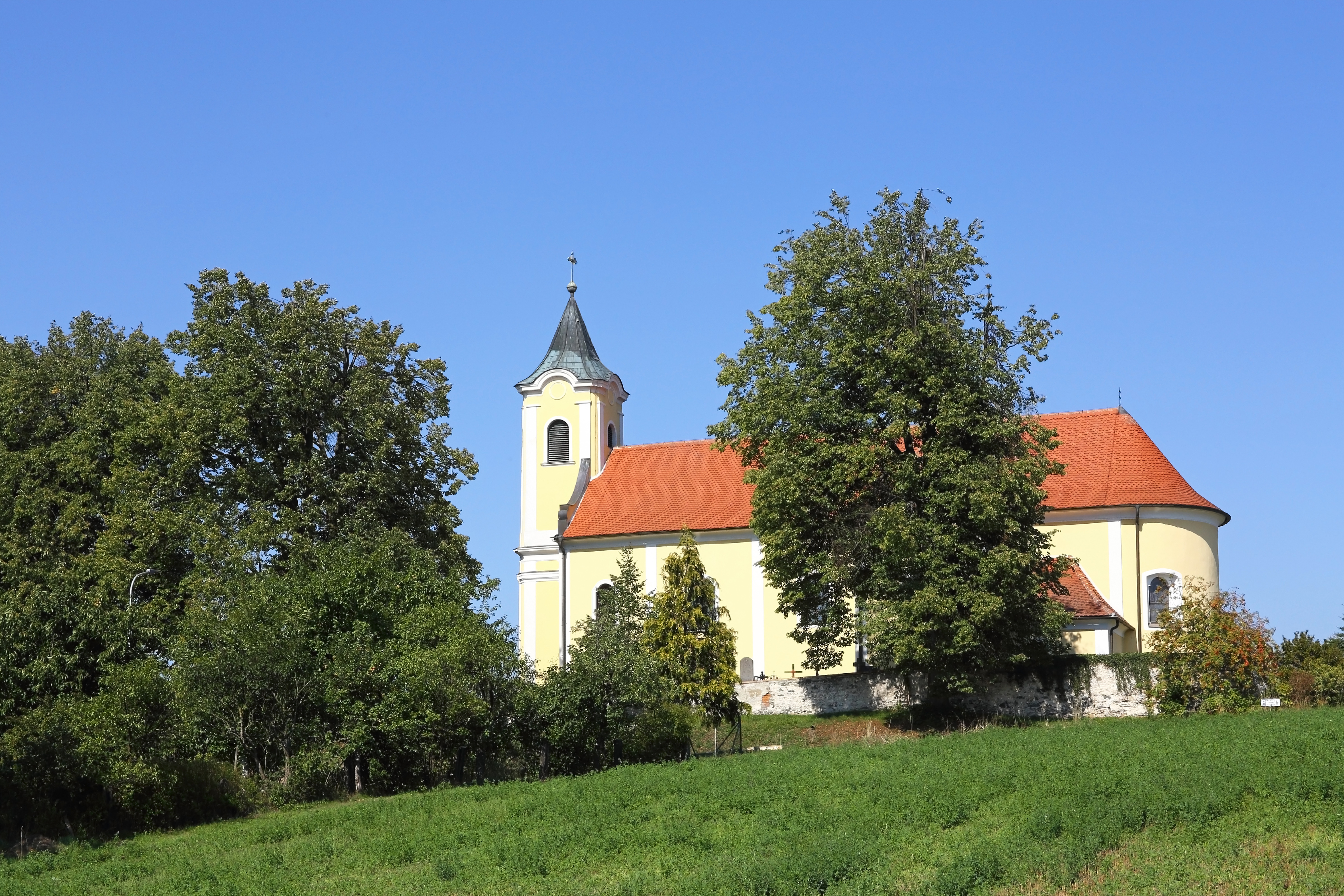 Die erhöht am Nordrand des Ortes gelegene und von einer Mauer umgebene Pfarrkirche hl. Johannes Nepomuk ist eine spätbarocke Saalkirche mit Westturm. Die fünf Winterlinden an der Südseite des Friedhofs wurden 1967 zum Naturdenkmal erklärt. This media shows the natural monument in Lower Austria with the ID HO-074.